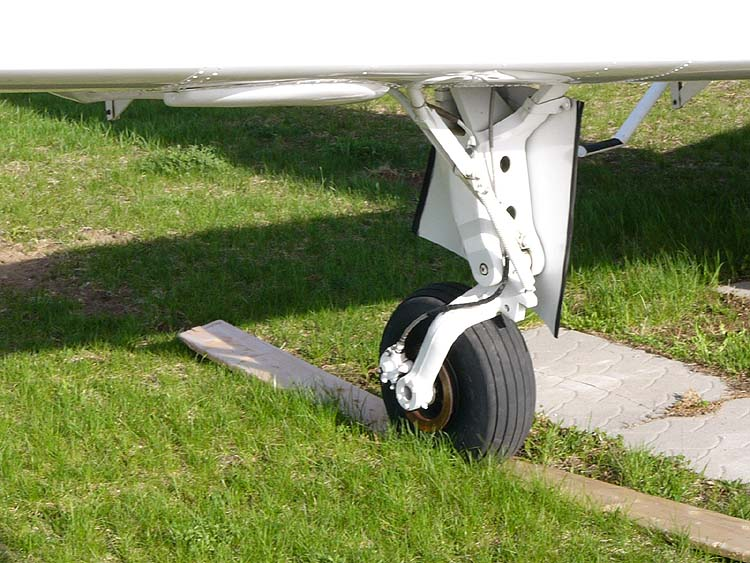 Beechcraft C24-R Sierra landing gear